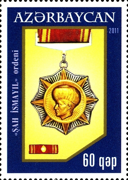 Azərbaycan Respublikasının Ordenləri.